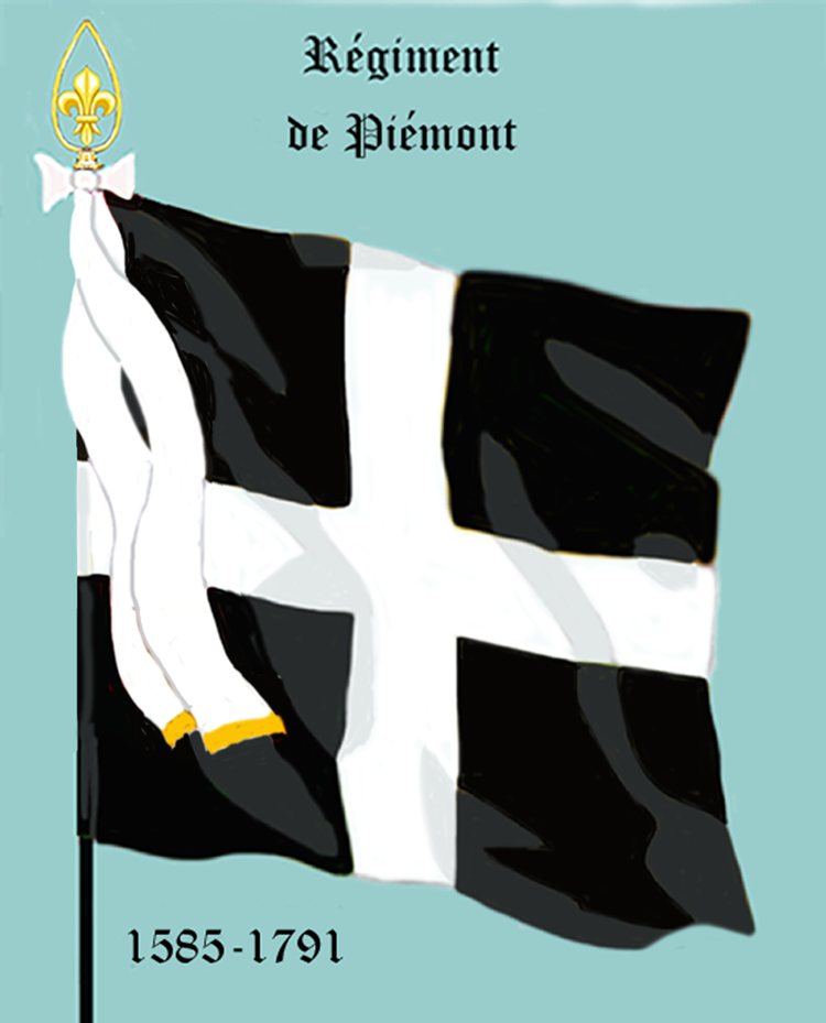 Ordonnanzfahne eines königlich französischen Infanterie-Regiments. - Entnommen und überarbeitet aus: „LES UNIFORMES ET LES DRAPEAUX DE L'ARMÉE DU ROI“ Marseille 1899. (Drapeau d'Ordonnance d' un régiment française d'infanterie royale.)